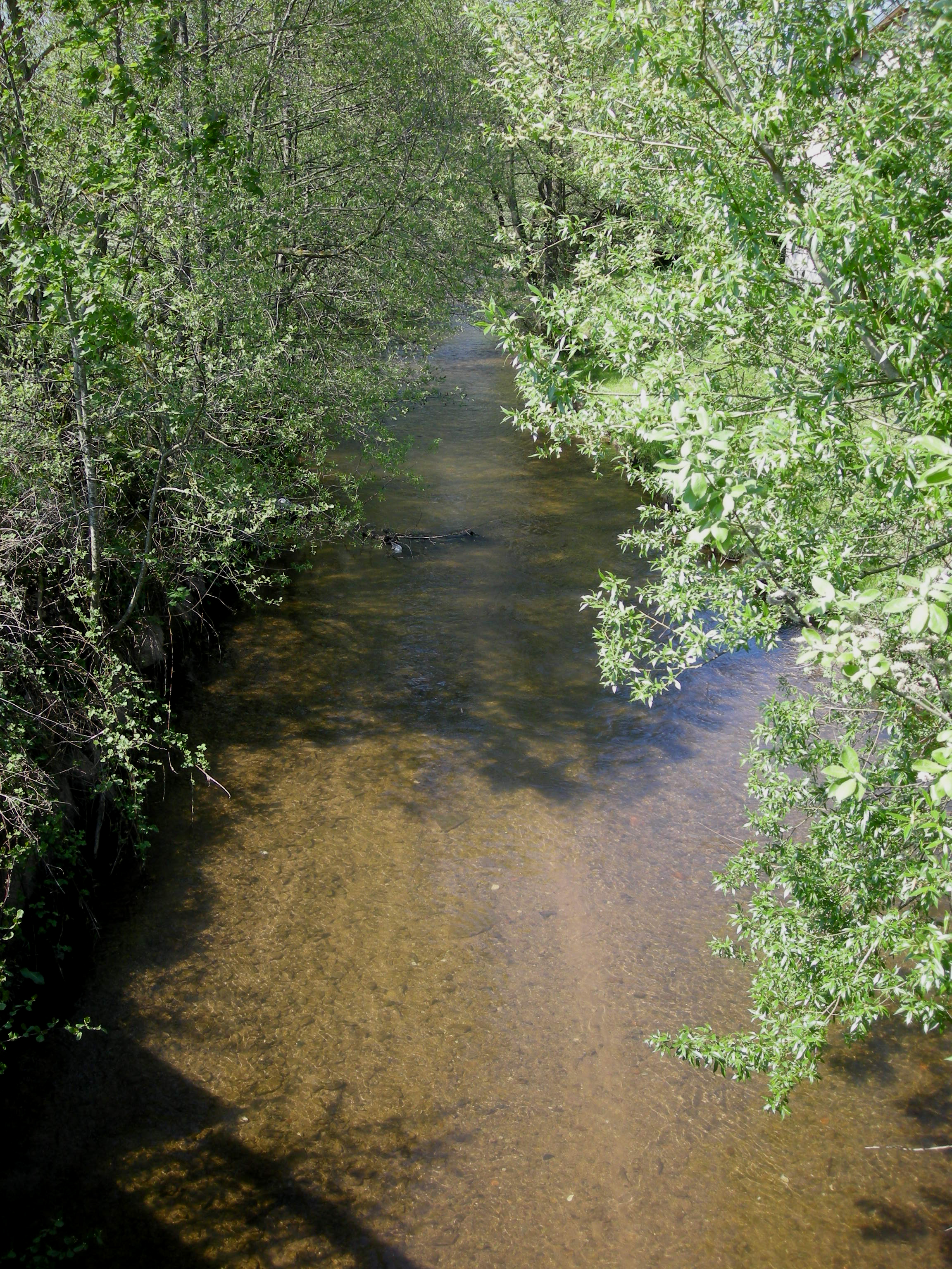 La Fave à Frapelle (Vosges)